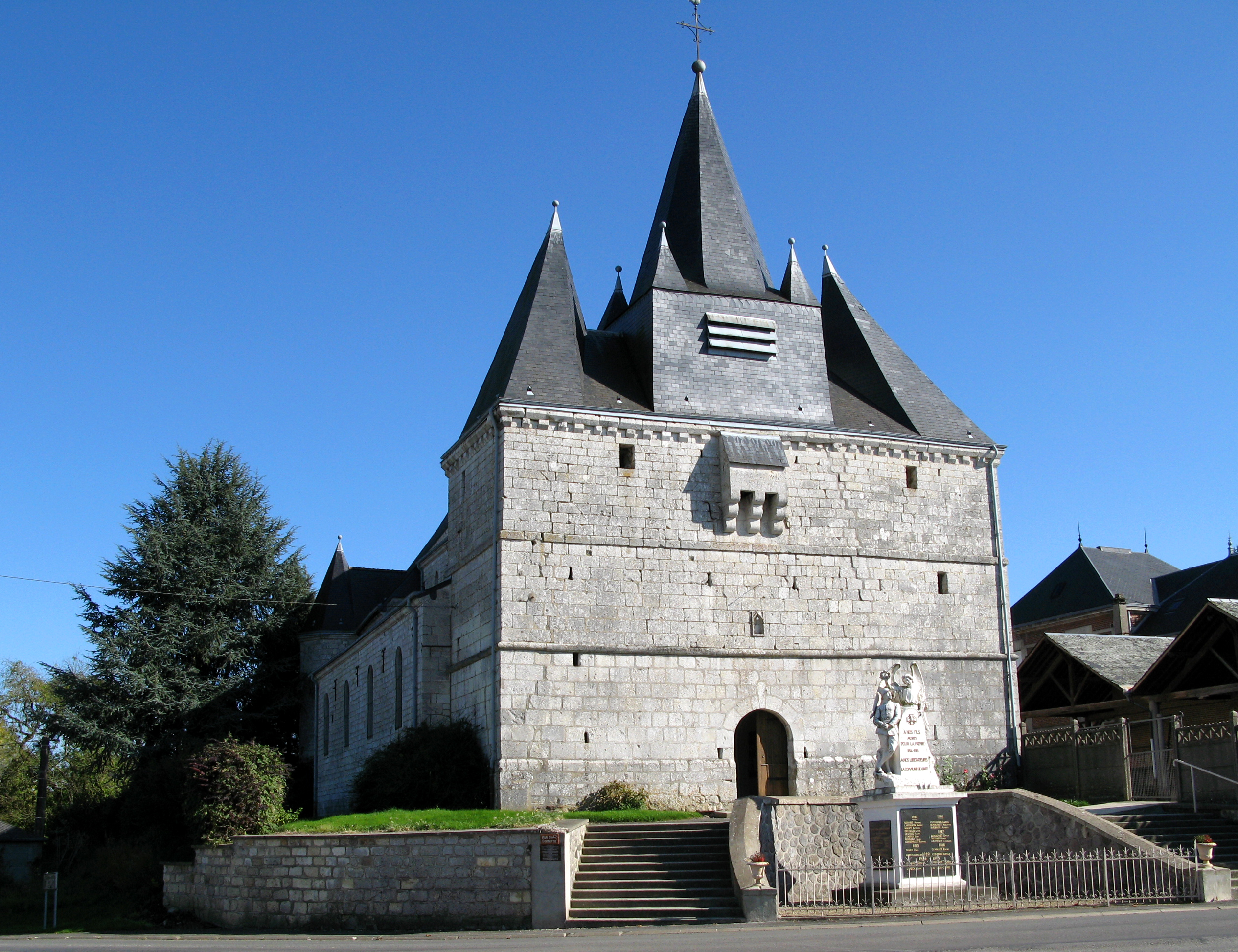 Liart (Ardennes, France) - Église Notre-Dame et monument-aux-morts. .